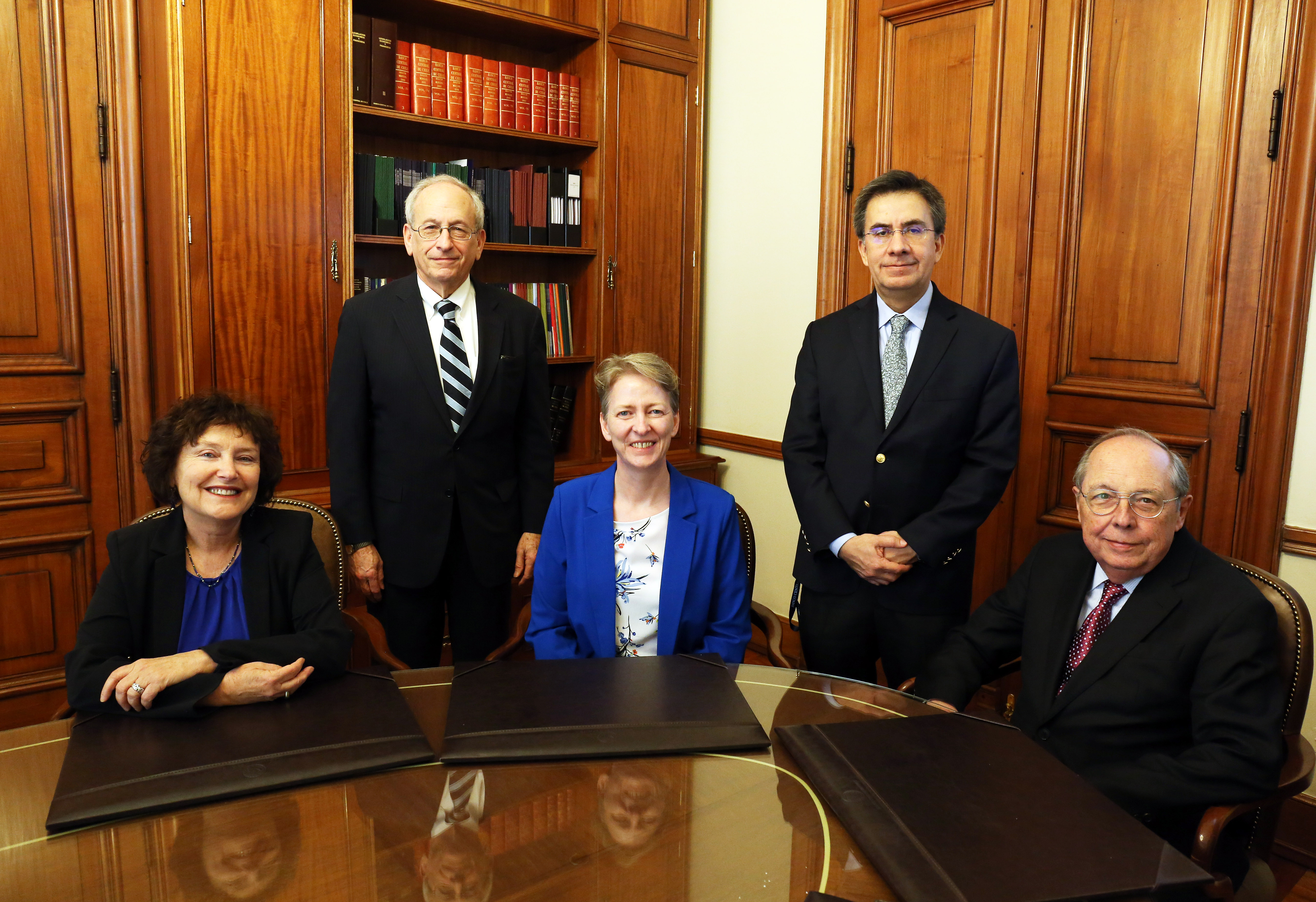 En el marco de la evaluación externa del desempeño del Banco Central de Chile, anunciada en el mes de septiembre pasado por el Presidente Mario Marcel ante el Senado, el panel de expertos convocado por el Instituto Emisor para analizar el cumplimiento del mandato que la Ley Orgánica Constitucional le consagra -la estabilidad de la moneda y un normal funcionamiento de los pagos internos y externos- realizó una serie de reuniones de trabajo en Chile. El panel es presidido por la exgobernadora del Banco de Israel Karnit Flug, e integrado por Petra Geraats (Universidad de Cambridge), Donald Kohn (Institución Brookings), Guillermo Calvo (Universidad de Columbia) y Enrique Mendoza (Universidad de Pensilvania). 22 de marzo.